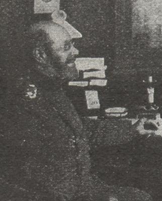 Adolph von Asch, bayerischer Kriegsminister